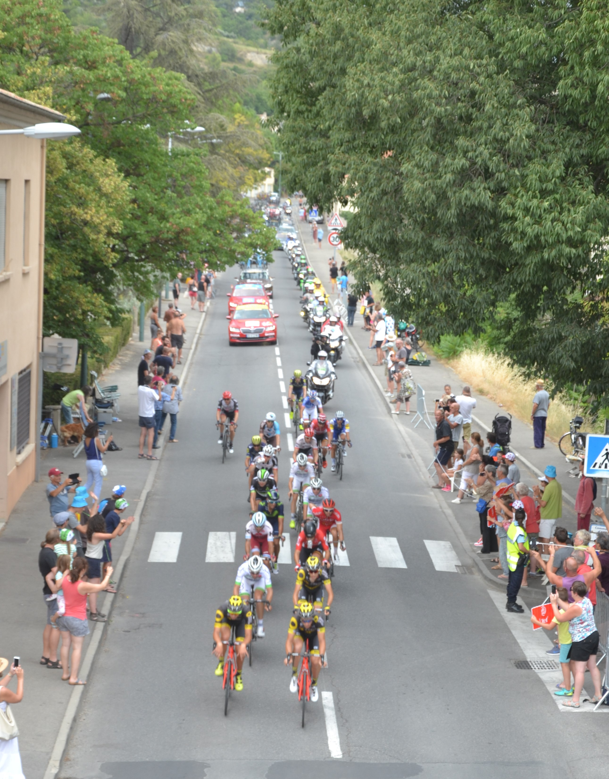 échappée entrant dans Apt (84)